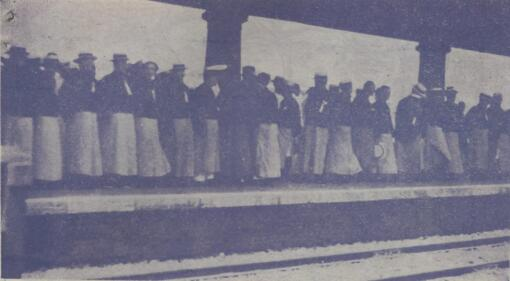 1929年国民党要人在浦口站迎接孙中山的灵柩 题名： 黨國要人在浦口站鵠候迎櫬：[照片] 文献来源： 《图画京报》 出版时间： 1929 年 卷期(页)： [ 奉安专号 ，1页 ]